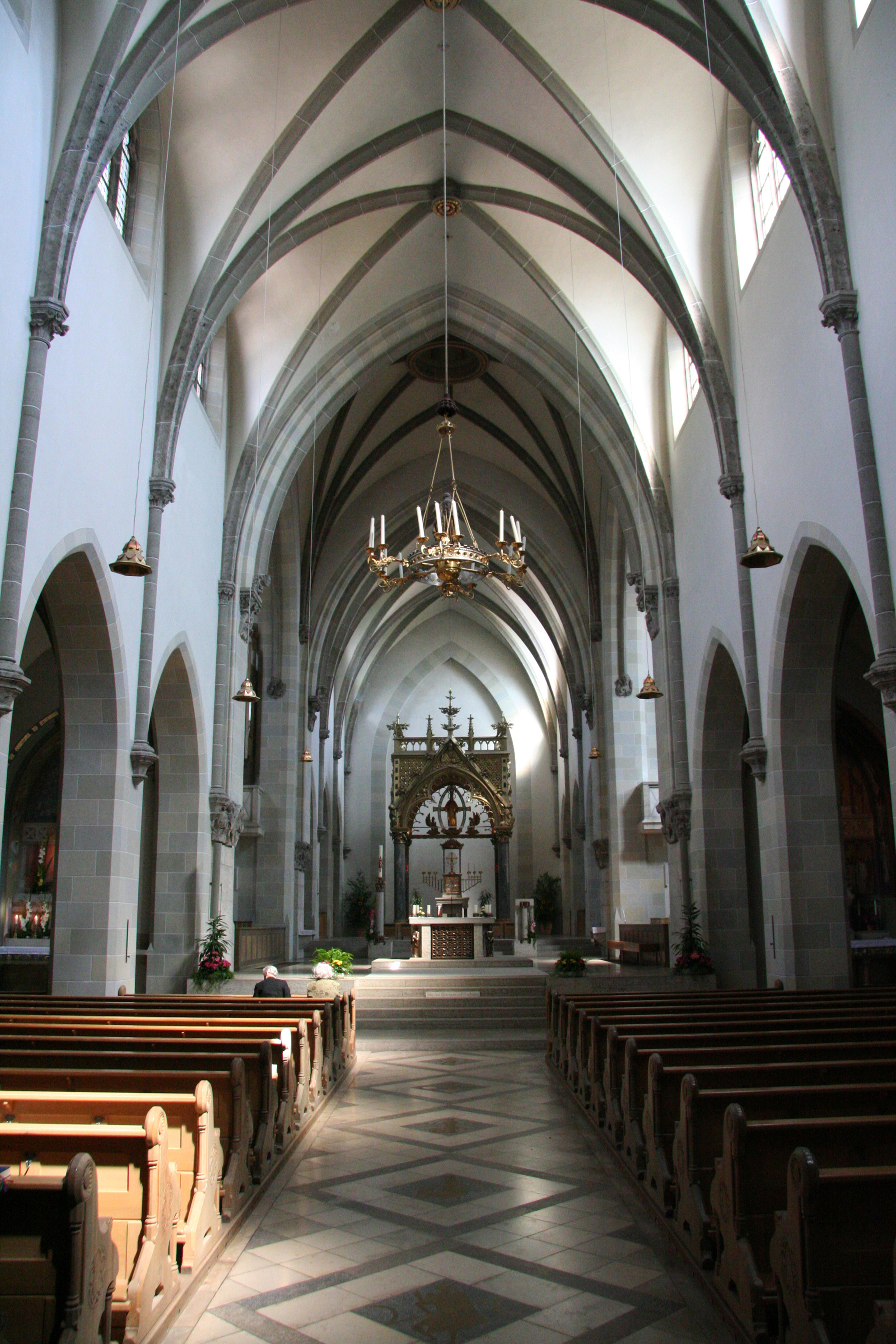 Erzabtei St. Ottilien inside, Eresing, Upper Bavaria, Benedictine monastary church